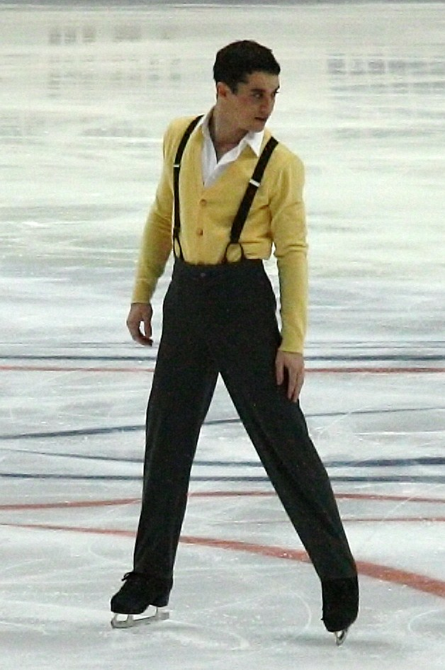 Хавьер Фернандес на Кубке Ростелекома 2011